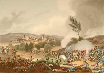 Gasteizko bataila, 1813ko ekainak 21